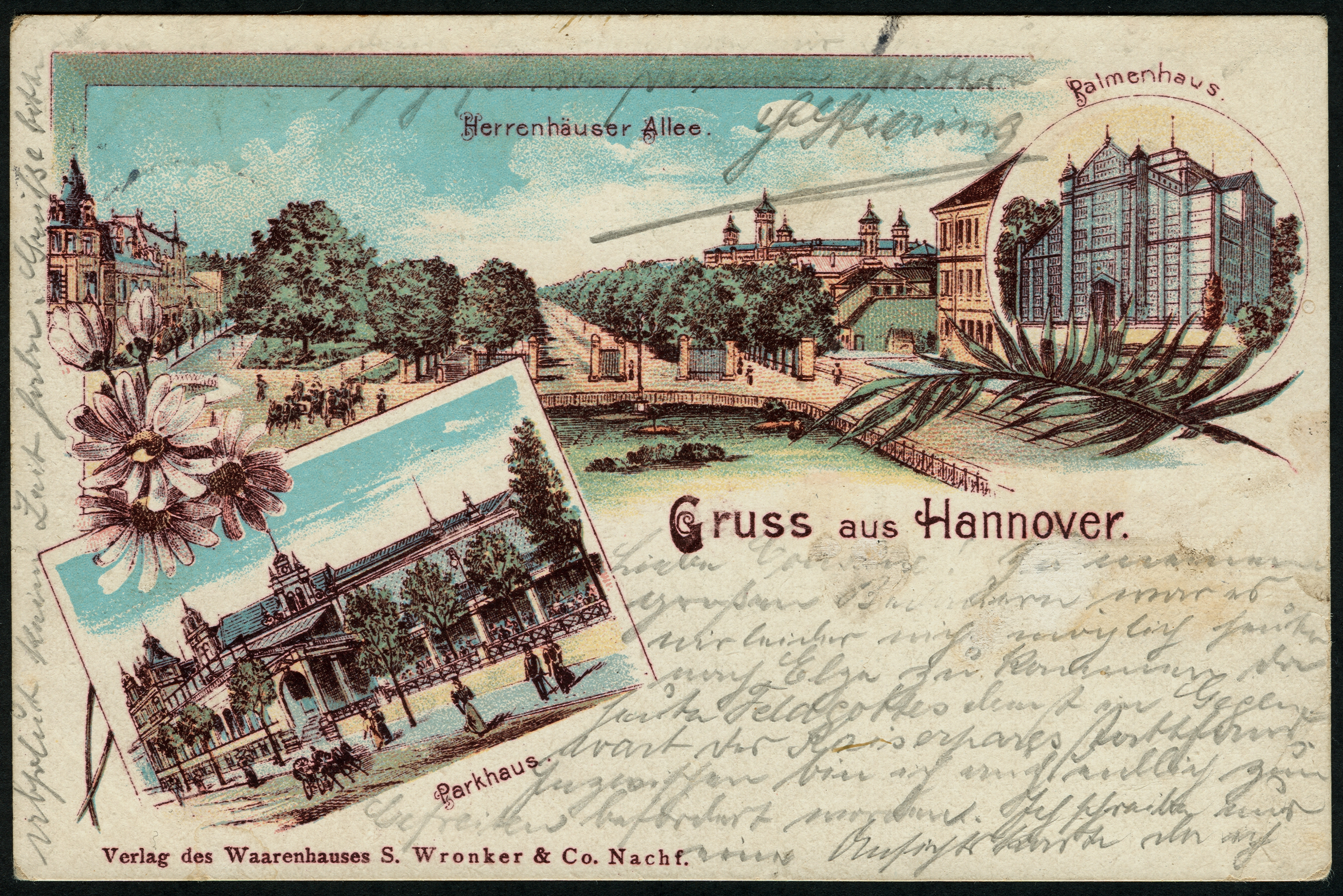 Ansichtskarte „Gruß aus Hannover”, Lithografie-Komposit mit Herrenhäuser Allee, Parkhaus und Palmenhaus;Der Absender war offensichtlich bei einem Besuch des Kaiserpaares zugegen, denn in seiner mit Bleistift beschriebenen Karte ist die Wortfolge „Feldgottesdienst in Gegenwart des Kaiserpares” (sic!) zu lesen.